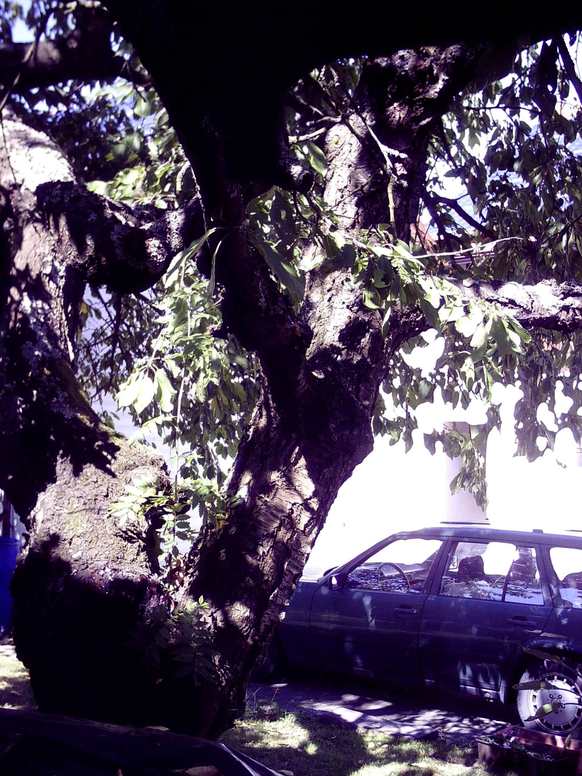 Epiphthisch wachsende Pflanze auf einem Kirschbaum